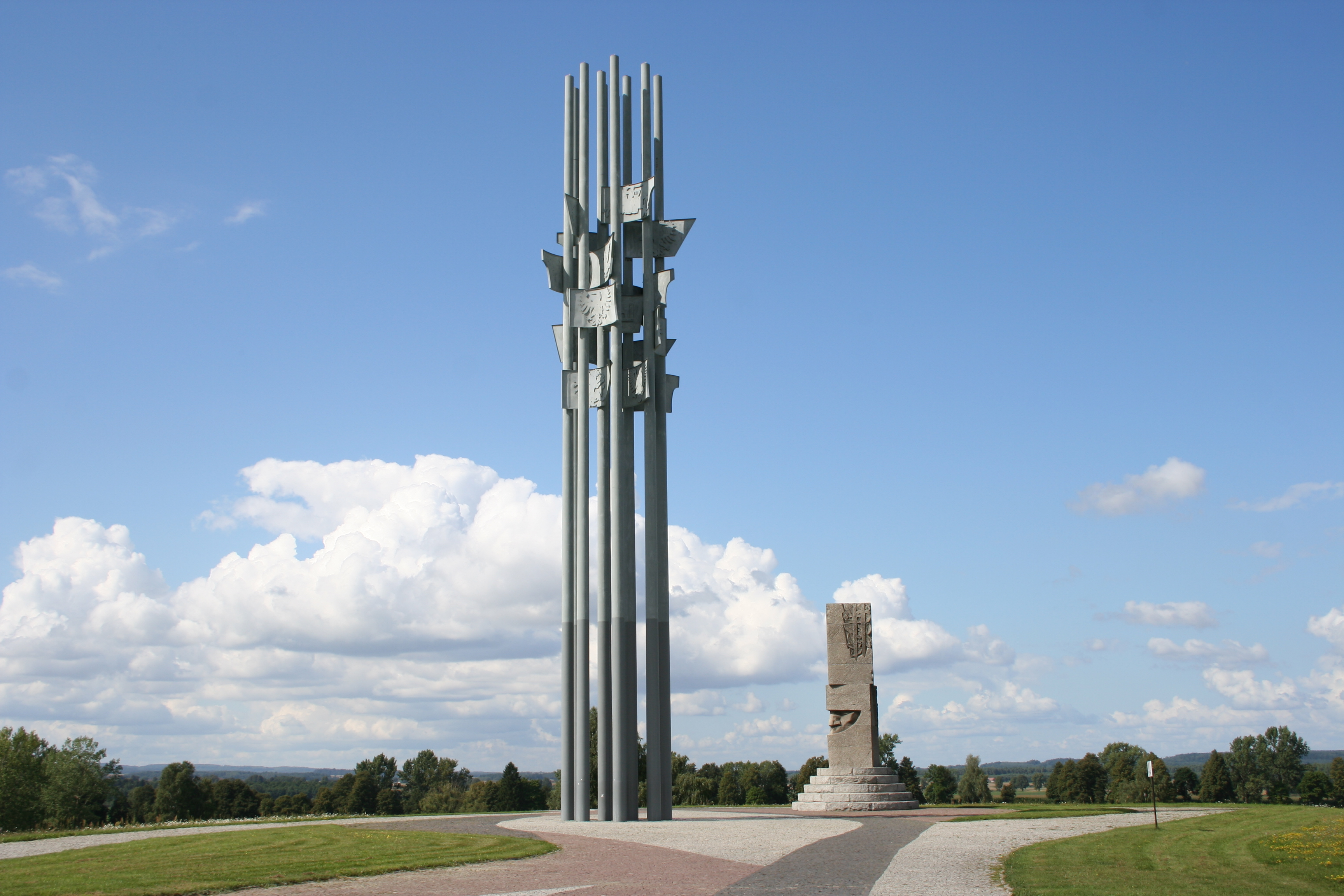 Grunwald, pomnik, 1960 (na polu bitwy z 1410)